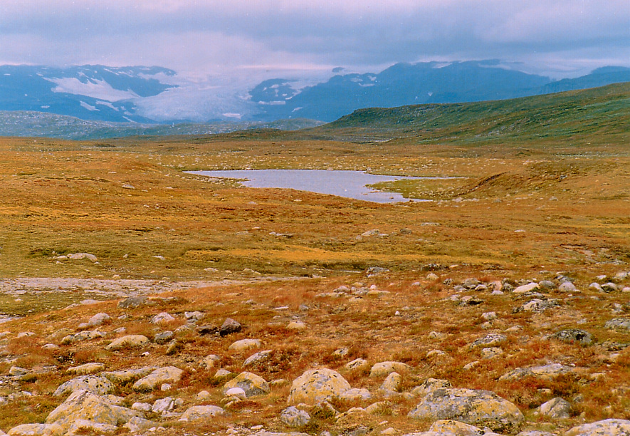 Hardangervidda